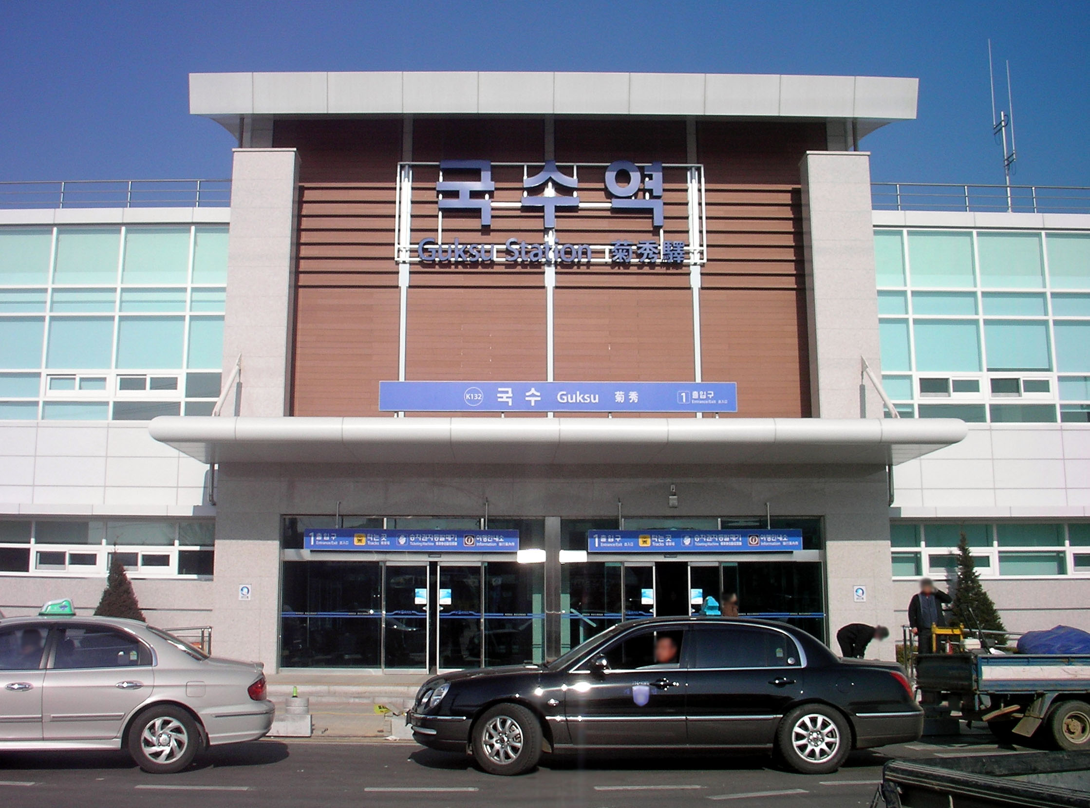 Guksu Station (ko)